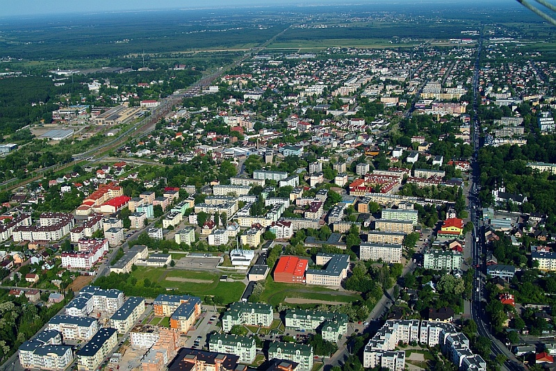 Zdjęcie lotnicze Mińska Mazowieckiego znad wschodniej części miasta w kierunku zachodnim. Dla orientacji: trzy ulice wychodzące z dolnej krawędzi tego zdjęcia to od lewej: Ulica 1. Pułku Lotnictwa Myśliwskiego "Warszawa" (długa nazwa bo od całej nazwy historycznej jednostki), Ulica Dąbrówki (księżna Polski), Ulica Warszawska (Droga krajowa nr 2).